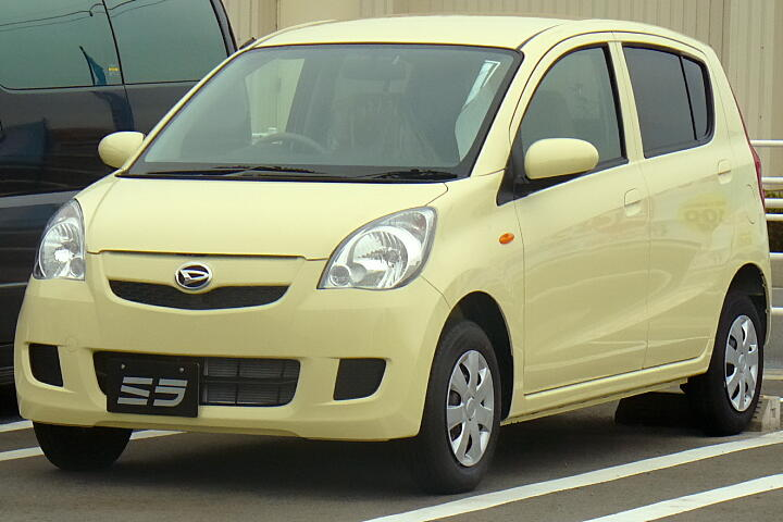 7代目ダイハツ・ミラ